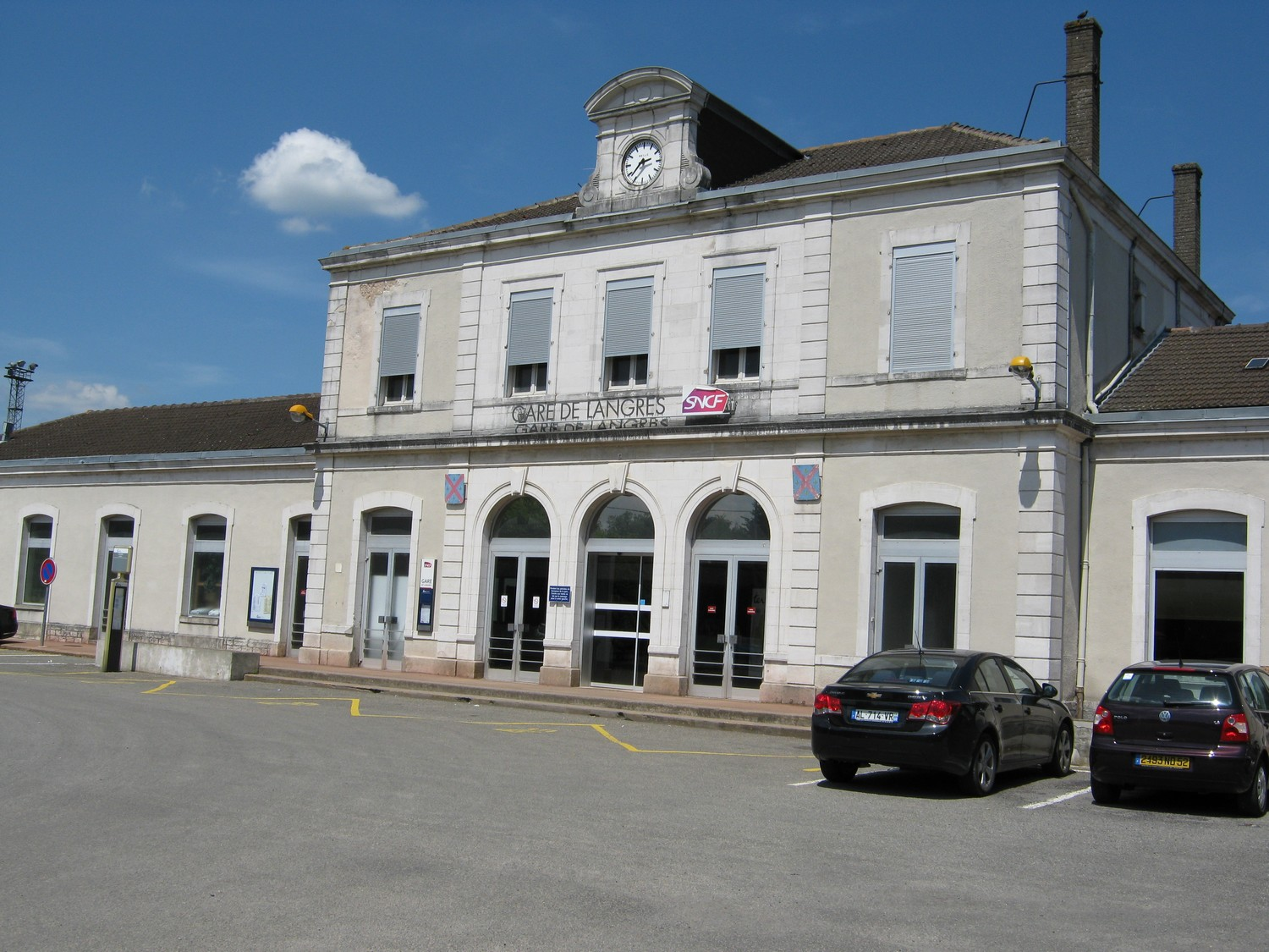 SNCF GARE de LANGRES